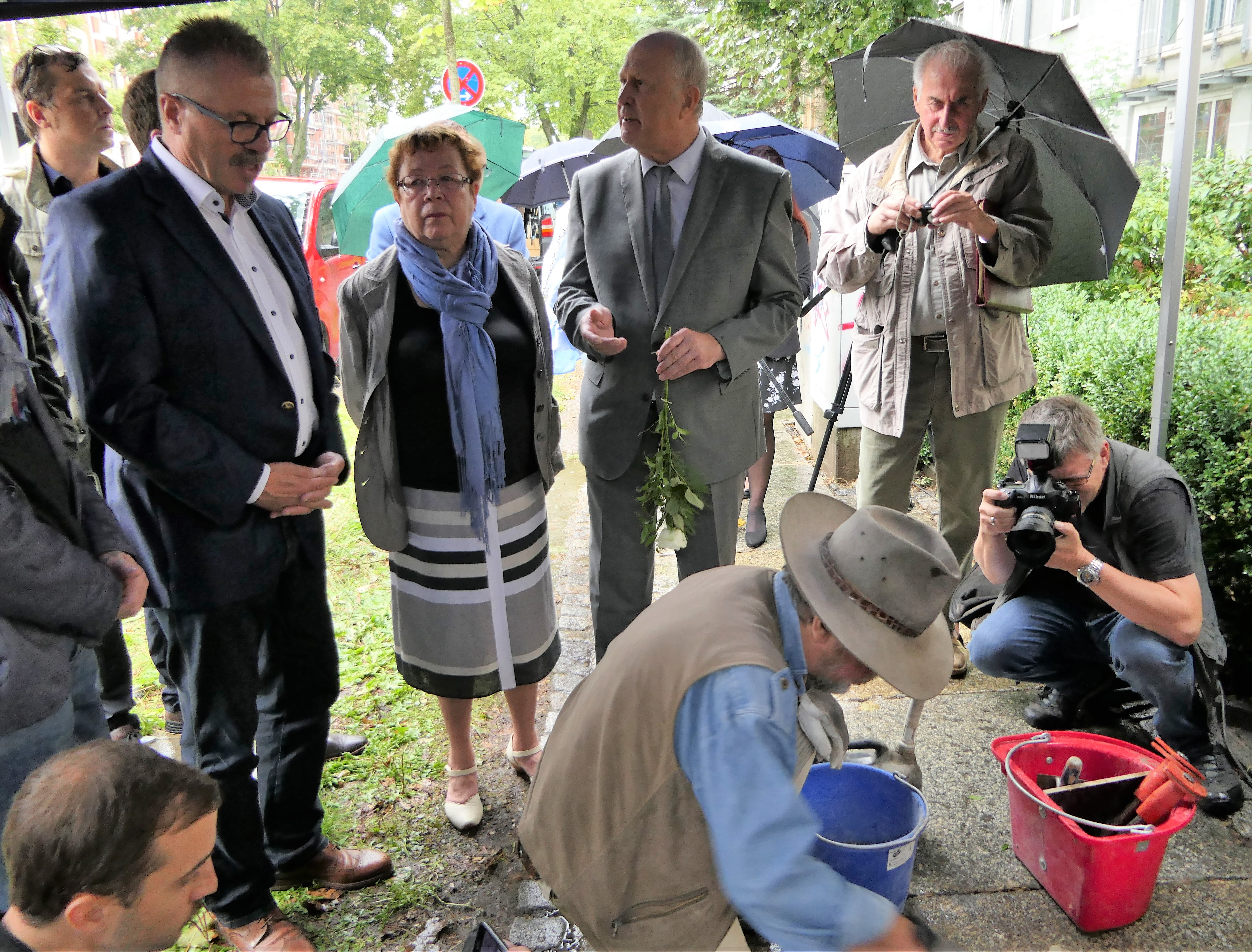 Stolpersteinverlegung für Rabbiner Dr. Hugo Fuchs in Chemnitz am 30. August 2018, Agricolastraße 15, auf dem Foto: Künstler Gunter Demnig, Bürgermeister Miko Runkel, Vorsitzende der Jüdischen Gemeinde Frau Dr. Ruth Röcher, Stadtarchivar Dr. Stephan Pfalzer